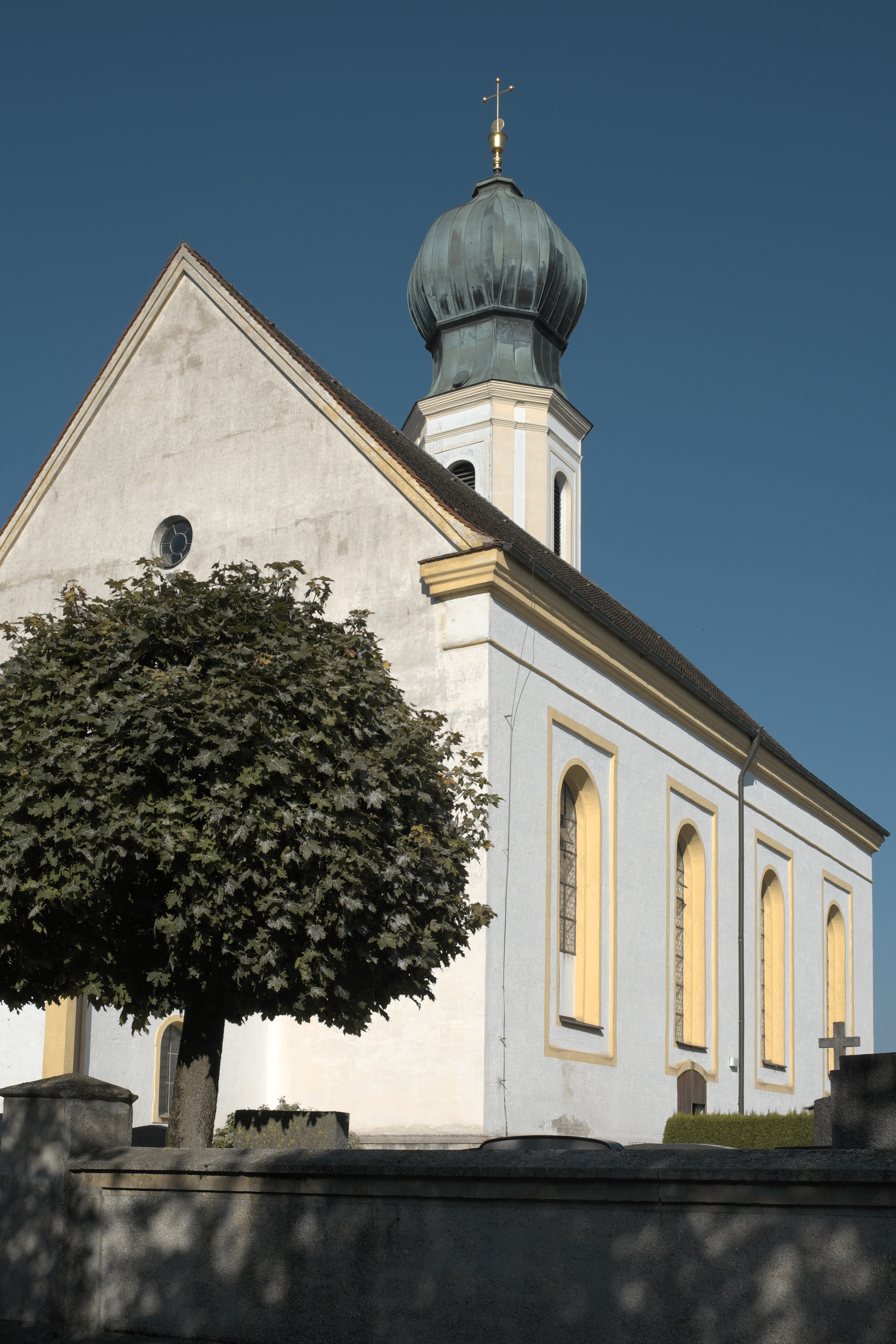 Katholische Pfarrkirche St. Sixtus in Moorenweis im Landkreis Fürstenfeldbruck (Bayern/Deutschland)